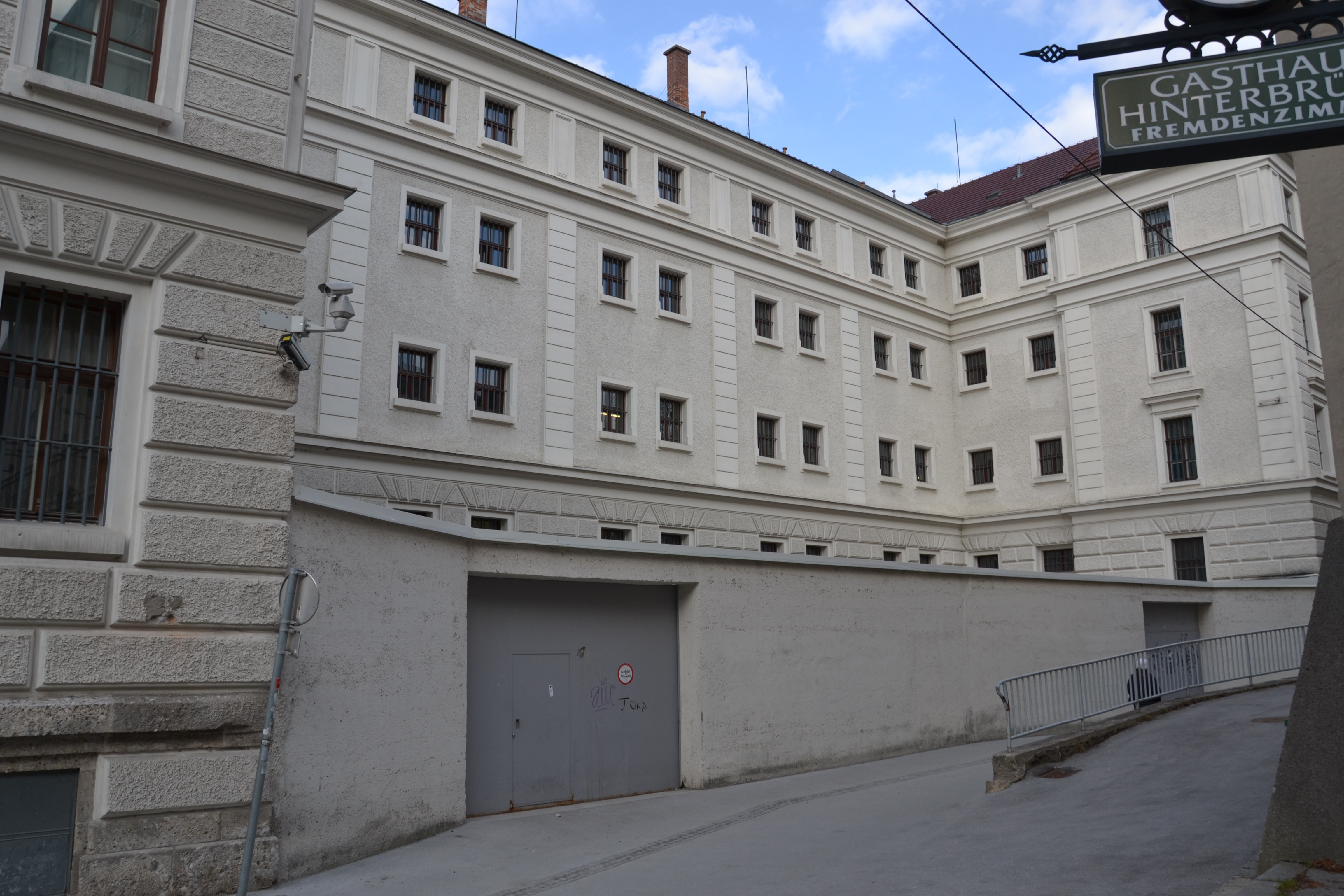 Justizanstalt Salzburg in der Stadt Salzburg. Teil des Landesgerichts Salzburg in der Salzburger Altstadt.